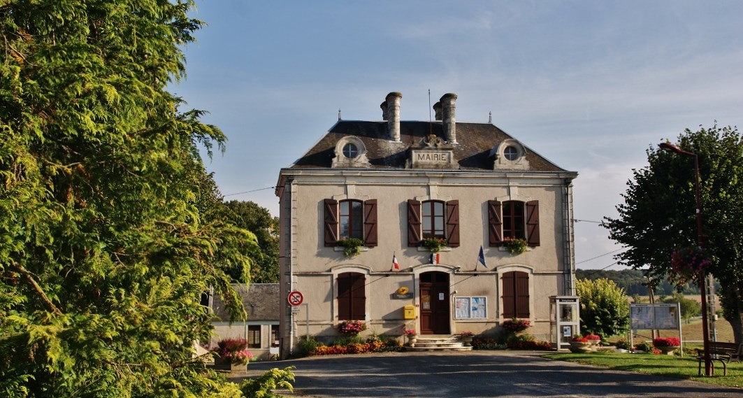 La Mairie